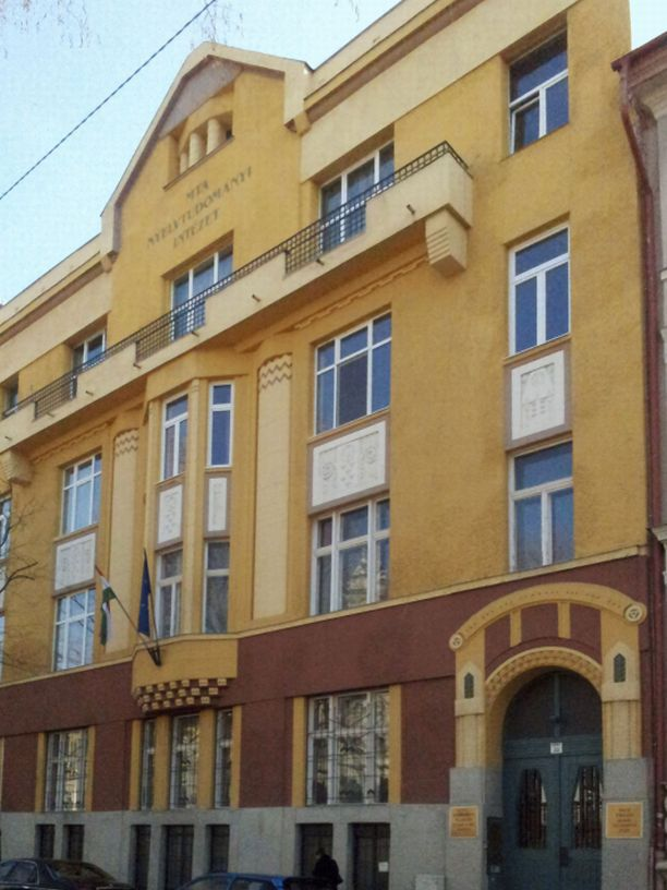 Az MTA Nyelvtudományi Intézetét ábrázolja